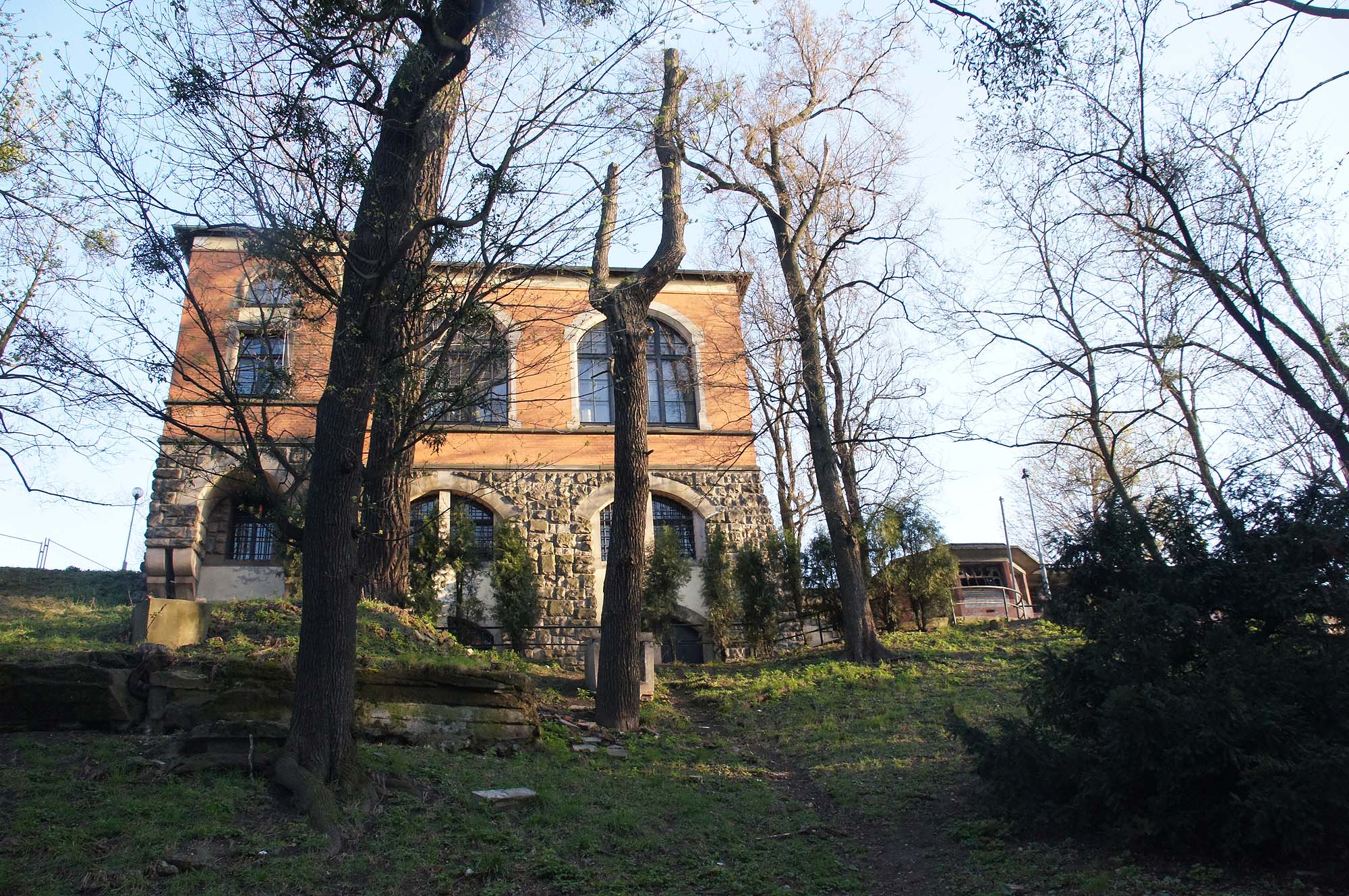 Wrocław, Bastion Sakwowy, tzw. Wzgórze Partyzantów, XIV, XVI, XIX